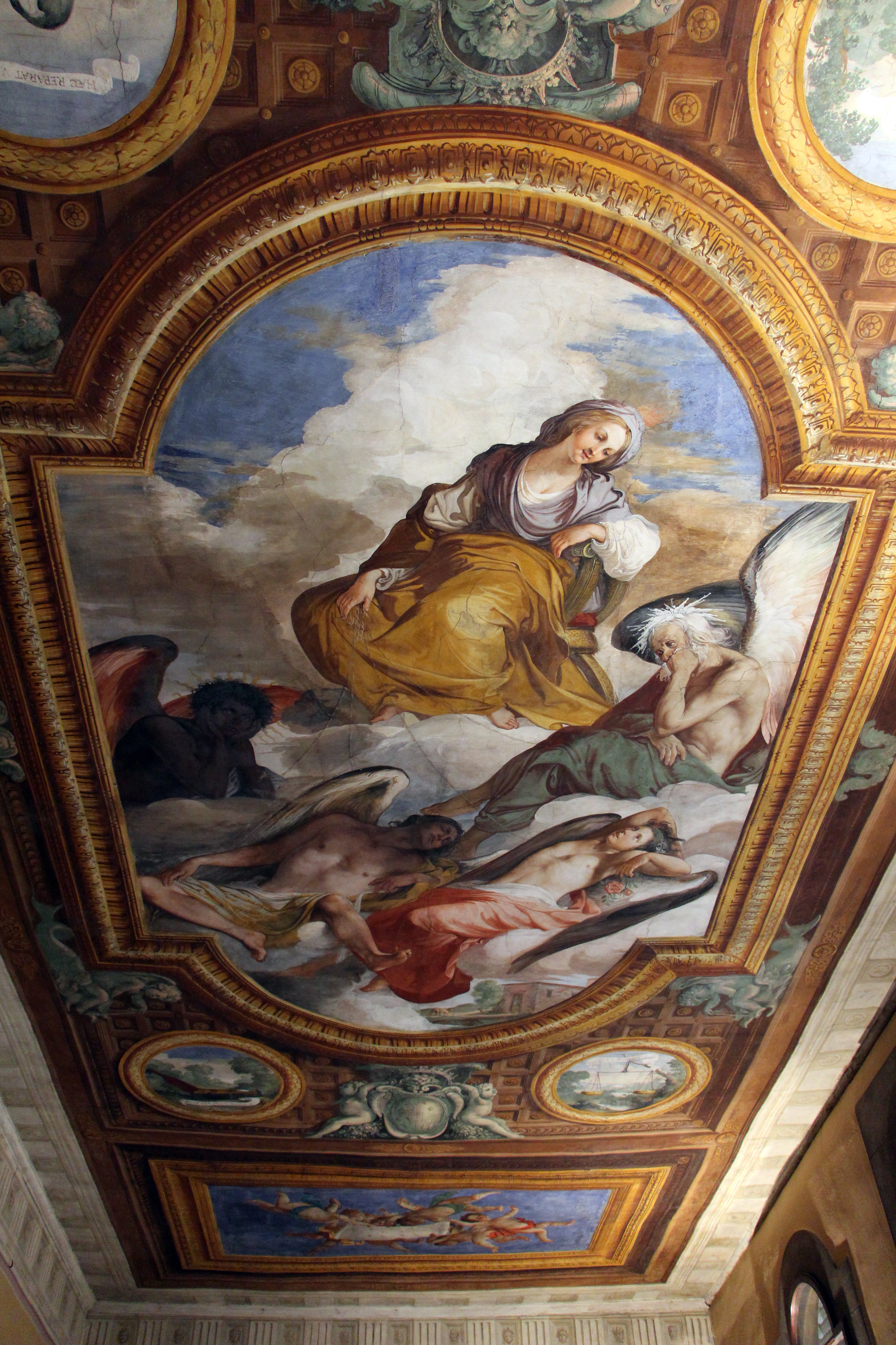 La Quiete che domina i Venti di Giovanni da San Giovanni